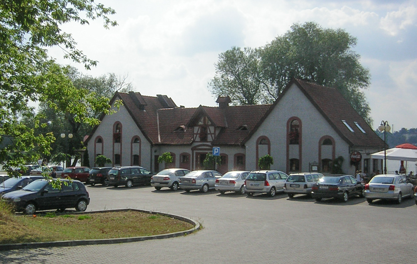 Tawerna Kaper w Iławie (dawna wozownia)